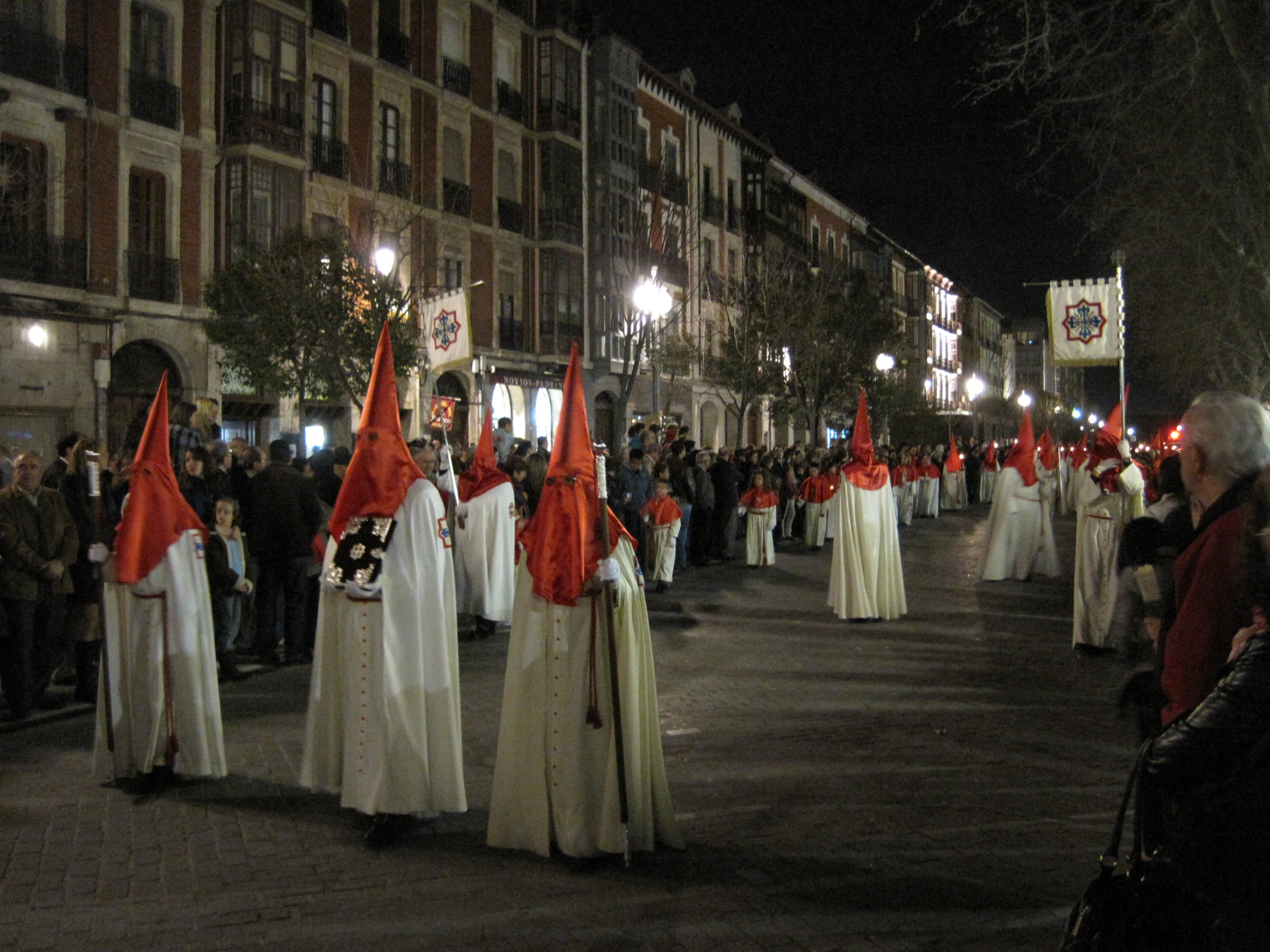 Cofrades en la Procesión del Santísimo Cristo de los Trabajos. Cofradía de las Siete Palabras, Valladolid (España).